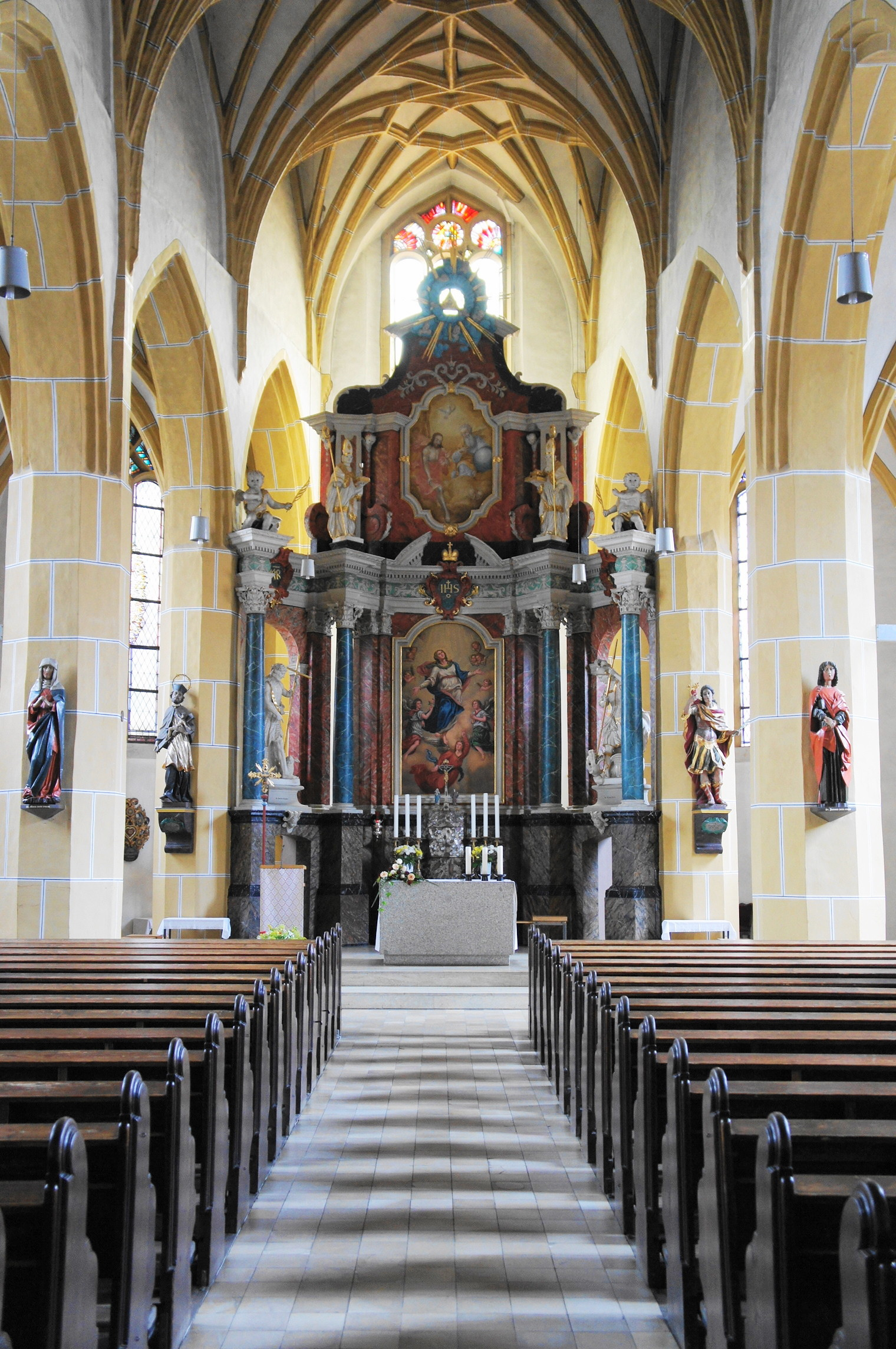 Katoholische Pfarrkirche "St. Mariä Himmelfahrt" in Wittichenau. Bereits um 1000 soll eine Holzkirche existiert haben, sie wurde 1230 ersetzt, 1429 durch die Hussiten zerstört, dann wieder aufgebaut bis 1440. Danach immer wieder Reparaturen und Erweiterungen, der letzte größere Eingriff in die dreischiffige Hallenkirche erfolgte 1971/72, bei der die Emporeneinbauten, mit Ausnahme der Orgelempore, entfernt wurden. Im Hintergrund der Hauptaltar: Blockaltar aus Lausitzer Granit, 1972, von Gottfried Zawadzki (Kamenz; * 1922); Hochaltar, 1722/23, von Maćij Wjacław Jakula/Mathias Wenzel Jäckel (Wittichenau/Prag; 1655–1738); Altarwerk, datiert auf 1597, von Andreas Dreßler (Kamenz; 1530–1604)